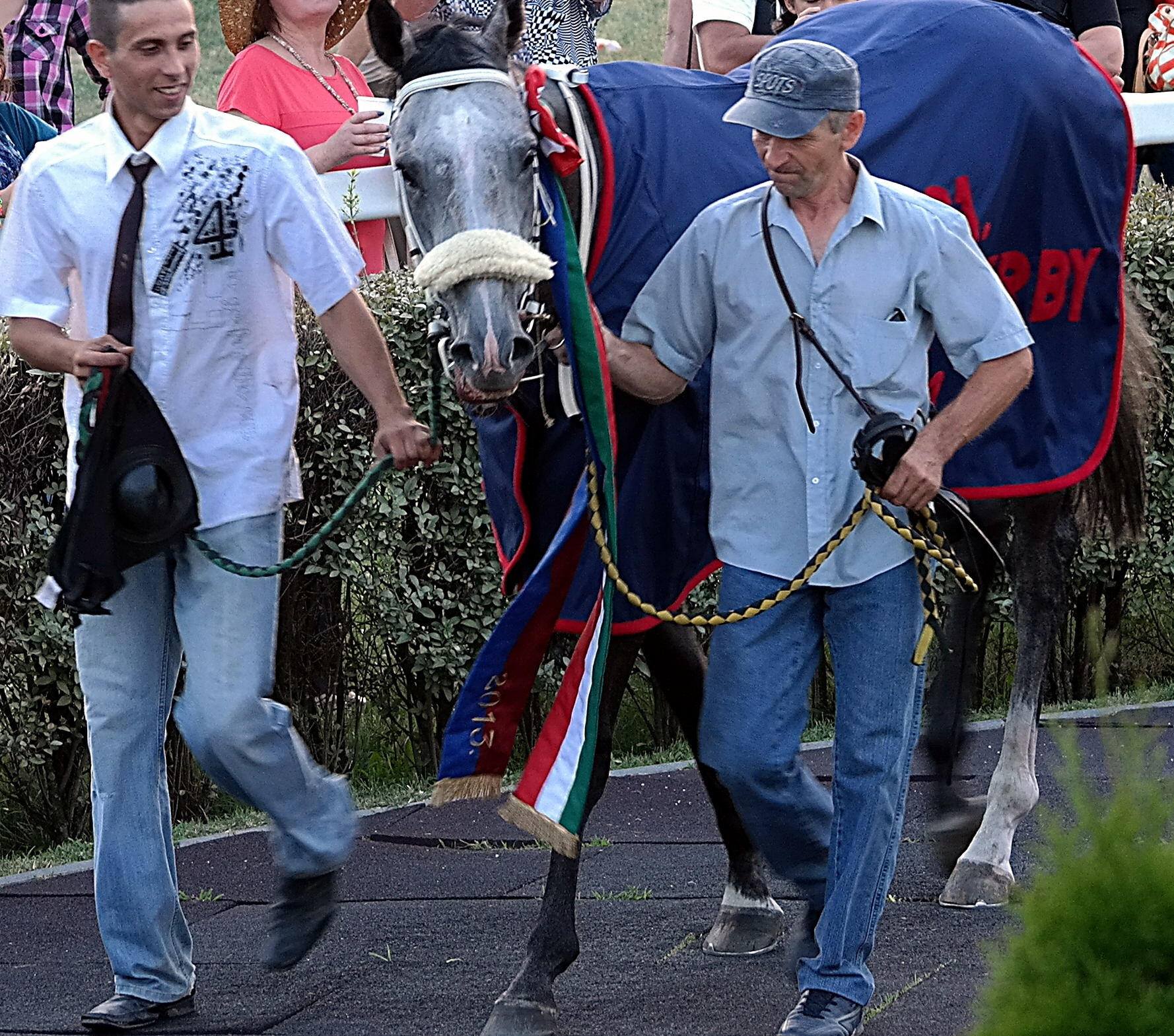 Magyar Derby 2013. A győztes Mayday. Kincsem Park.